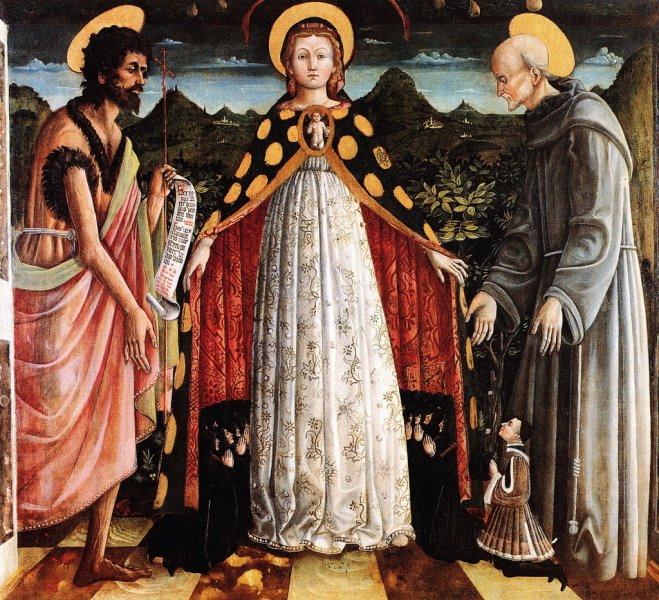 Dario di Giovanni - Madonna della Misericordia (1460) tempera su tela - 168 x 184 cm Museo Civico, Bassano del Grappa